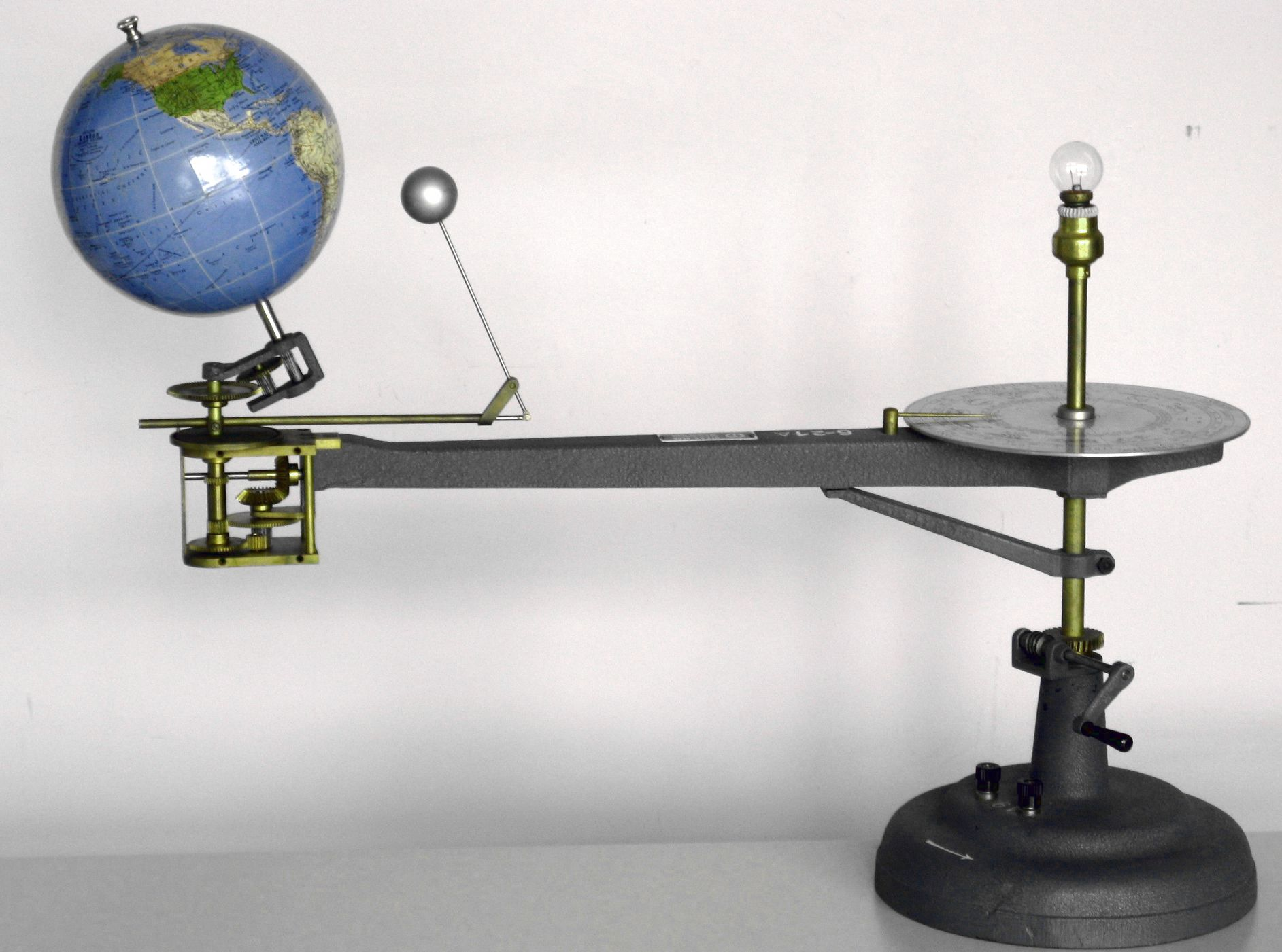 Tellurium: nachgebildet sind die Drehung der Erde um die eigene Achse, ihre Bahnfahrt um die Sonne, die elliptische Bahnfahrt des Mondes um die Erde und die Apsidendrehung des Mondes (letztere mit prinzipiellem Fehler), gefertigt von der Firma Utz/Bern